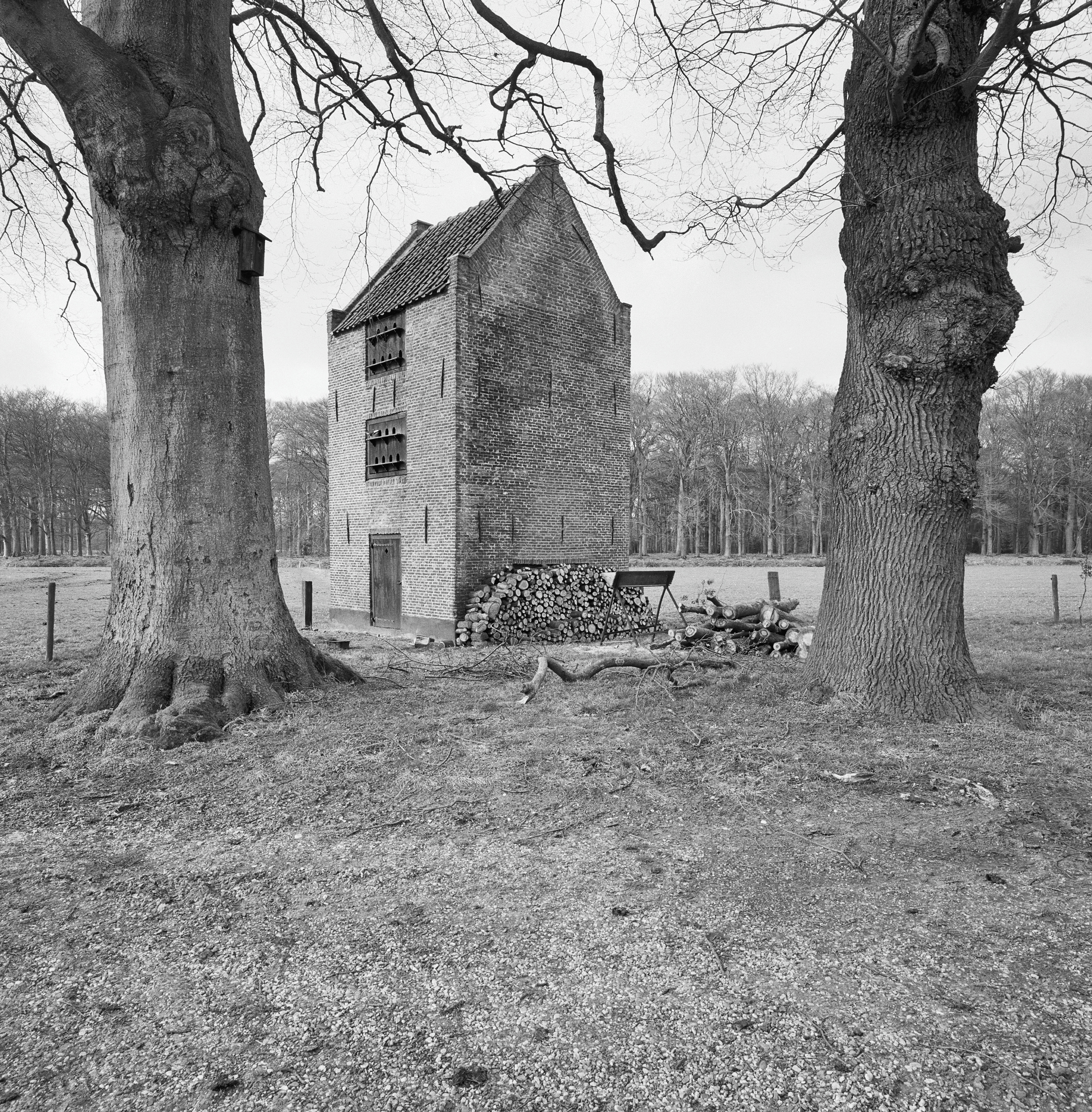 Schevichoven: Duiventoren op terrein Schevichoven (opmerking: Gefotografeerd voor De Utrechtse Heuvelrug)